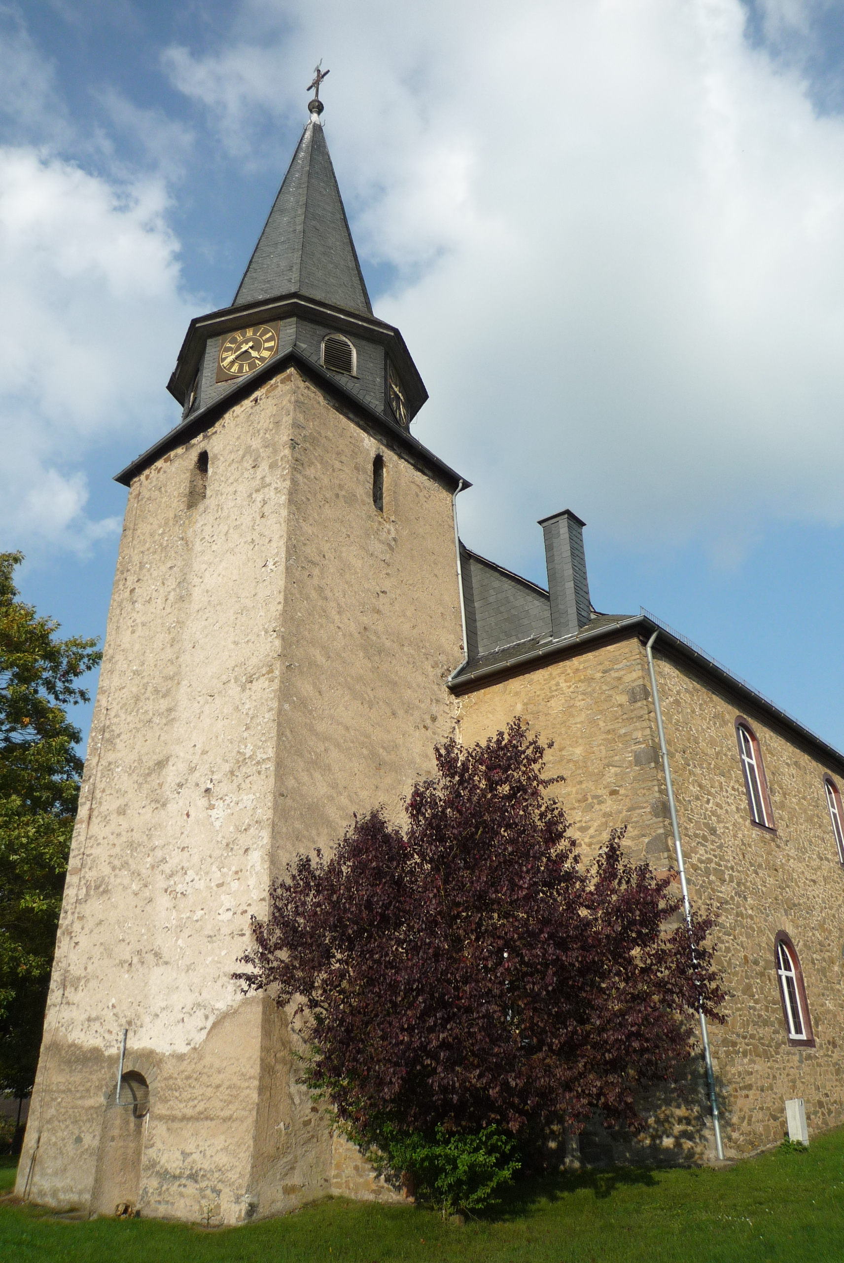 Evangelische Pfarrkirche Altenkirchen